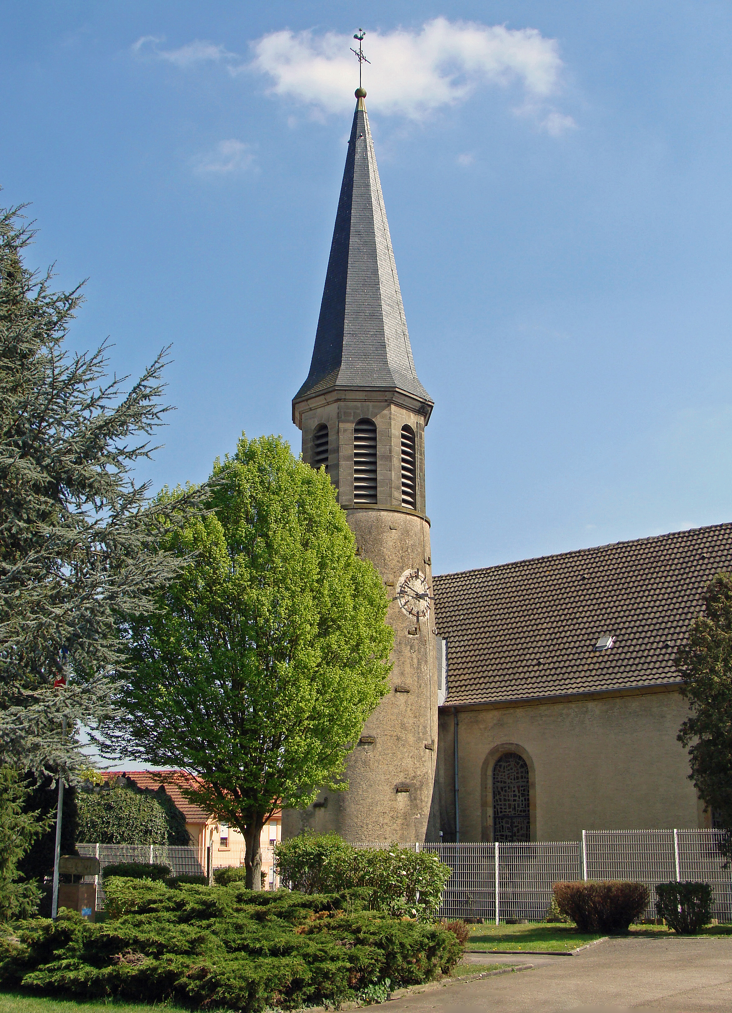 L'église catholique Saint-Jean-Baptiste de Farébersviller construite de 1757 à 1767, agrandie de 1850 à 1855 et son clocher rond d'origine romane